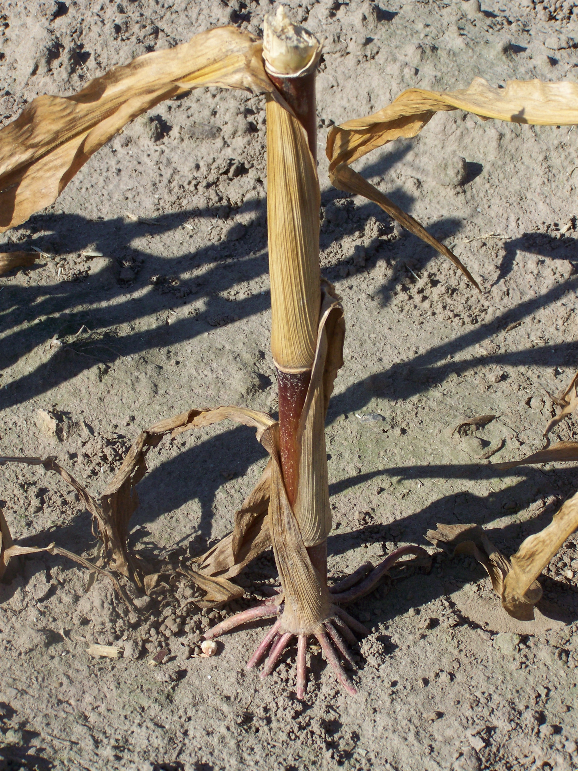 Wurzelgeflecht einer Maispflanze nach der Ernte